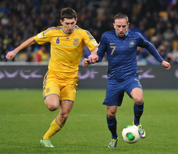 Stepanenko battling for the ball with Franck Ribéry